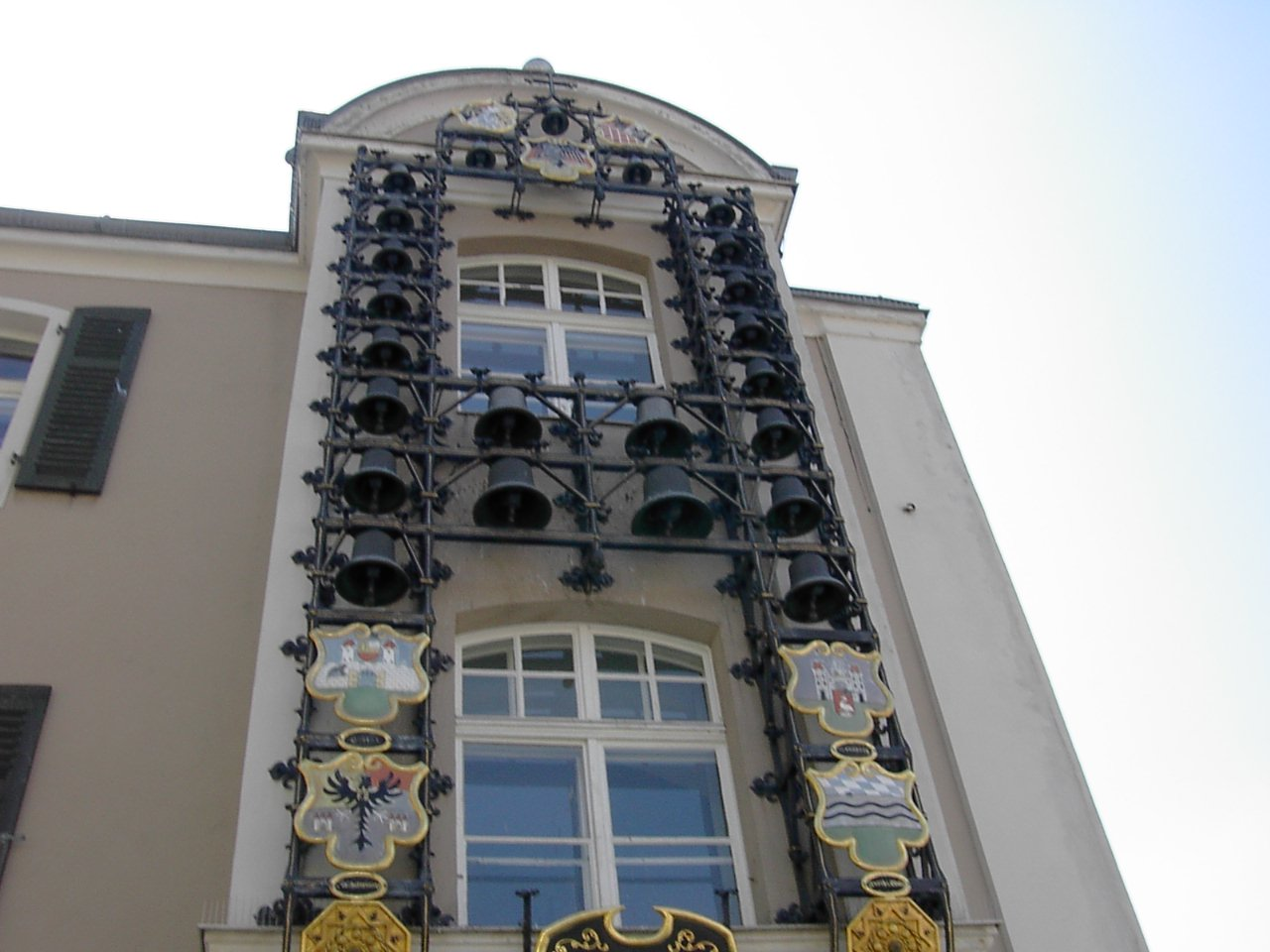 Glockenspiel in Furth i.W., Bayern